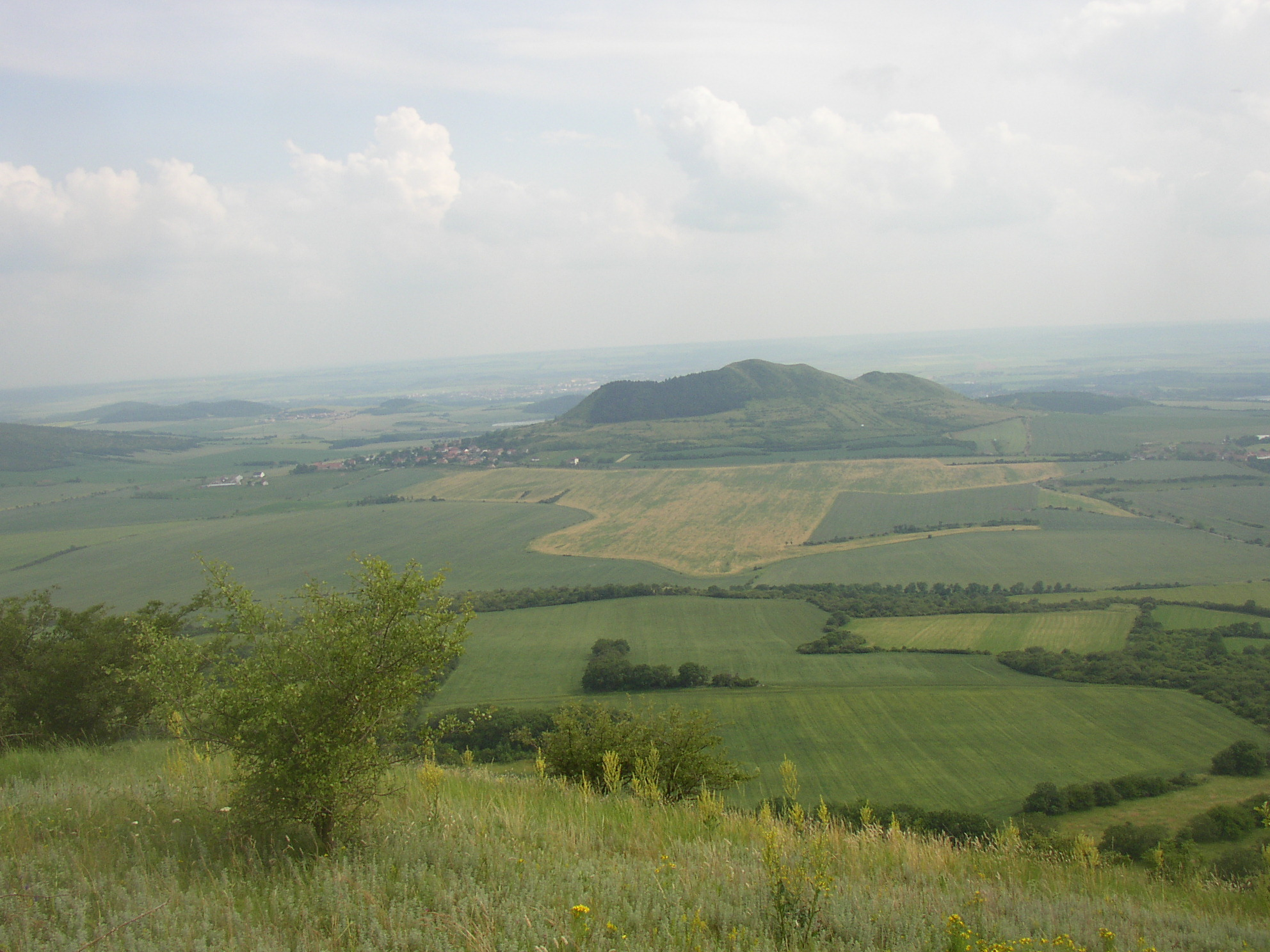 České středohoří. Pohled z Milé jihojihovýchodním směrem na Ranou.